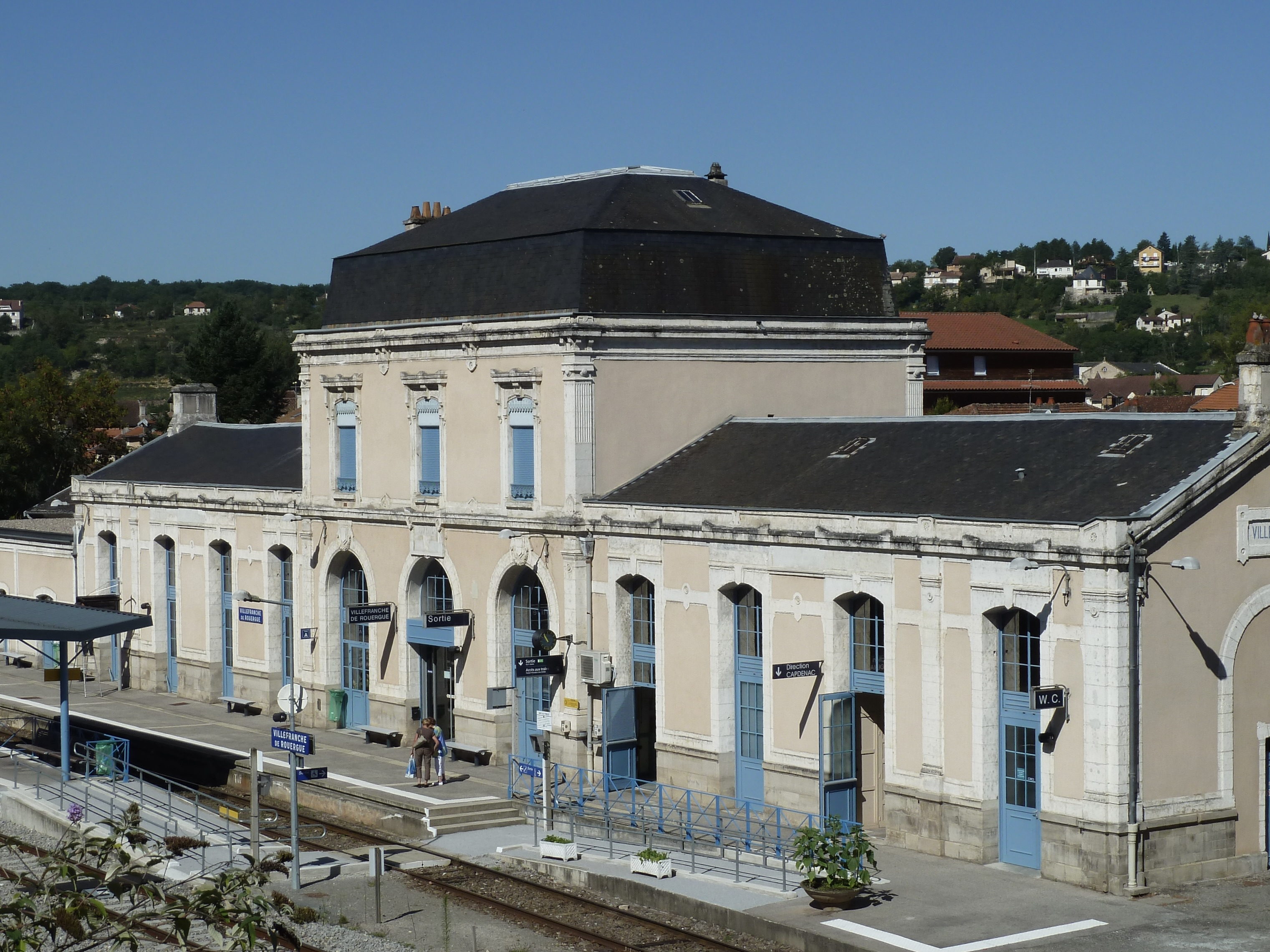 Gare de Villefranche-de-Rouergue (12) : Le bâtiment voyageurs.